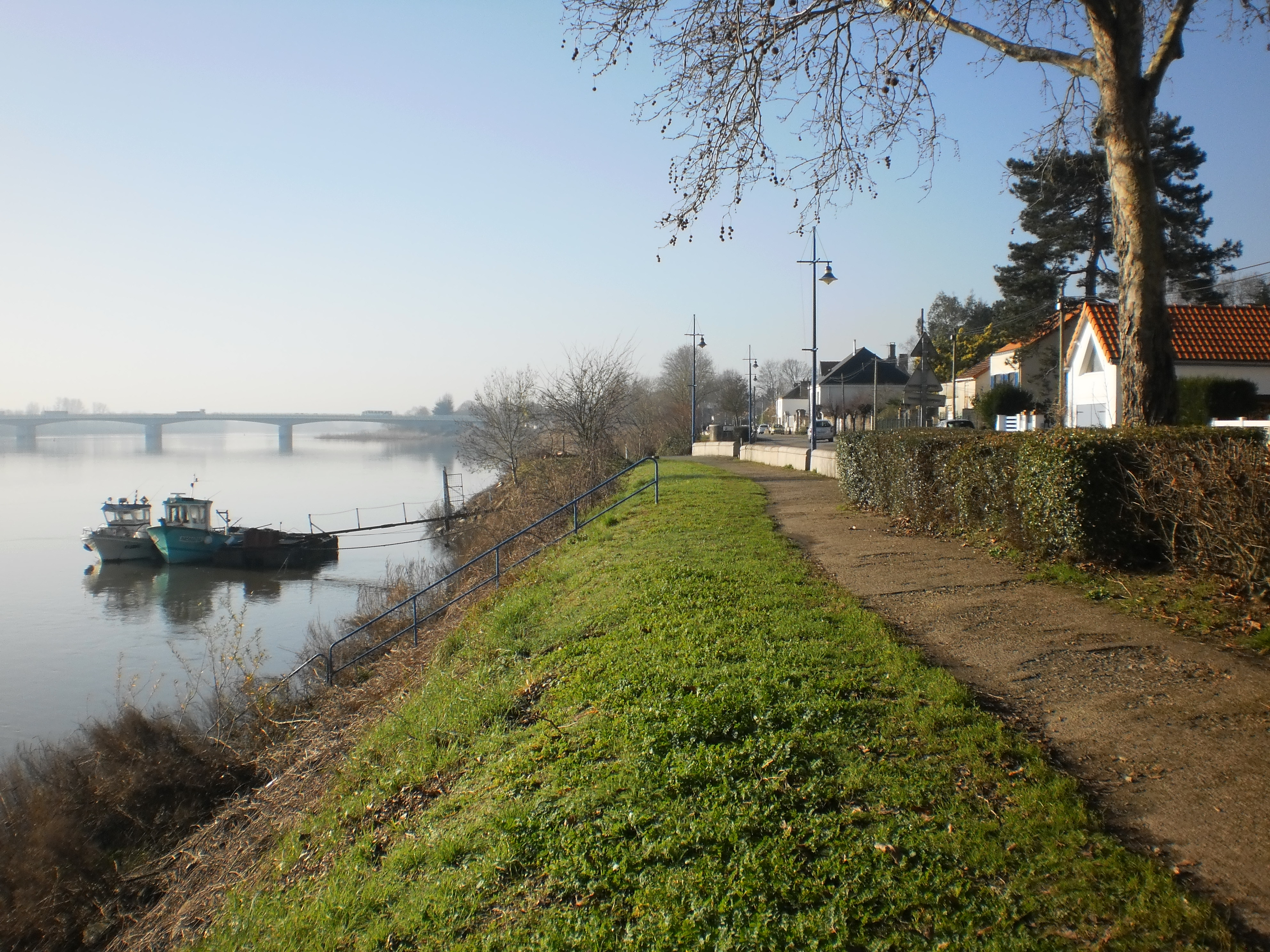 Rive de Loire à Bellevue - Sainte-Luce-sur-Loire (Loire-Atlantique, France).